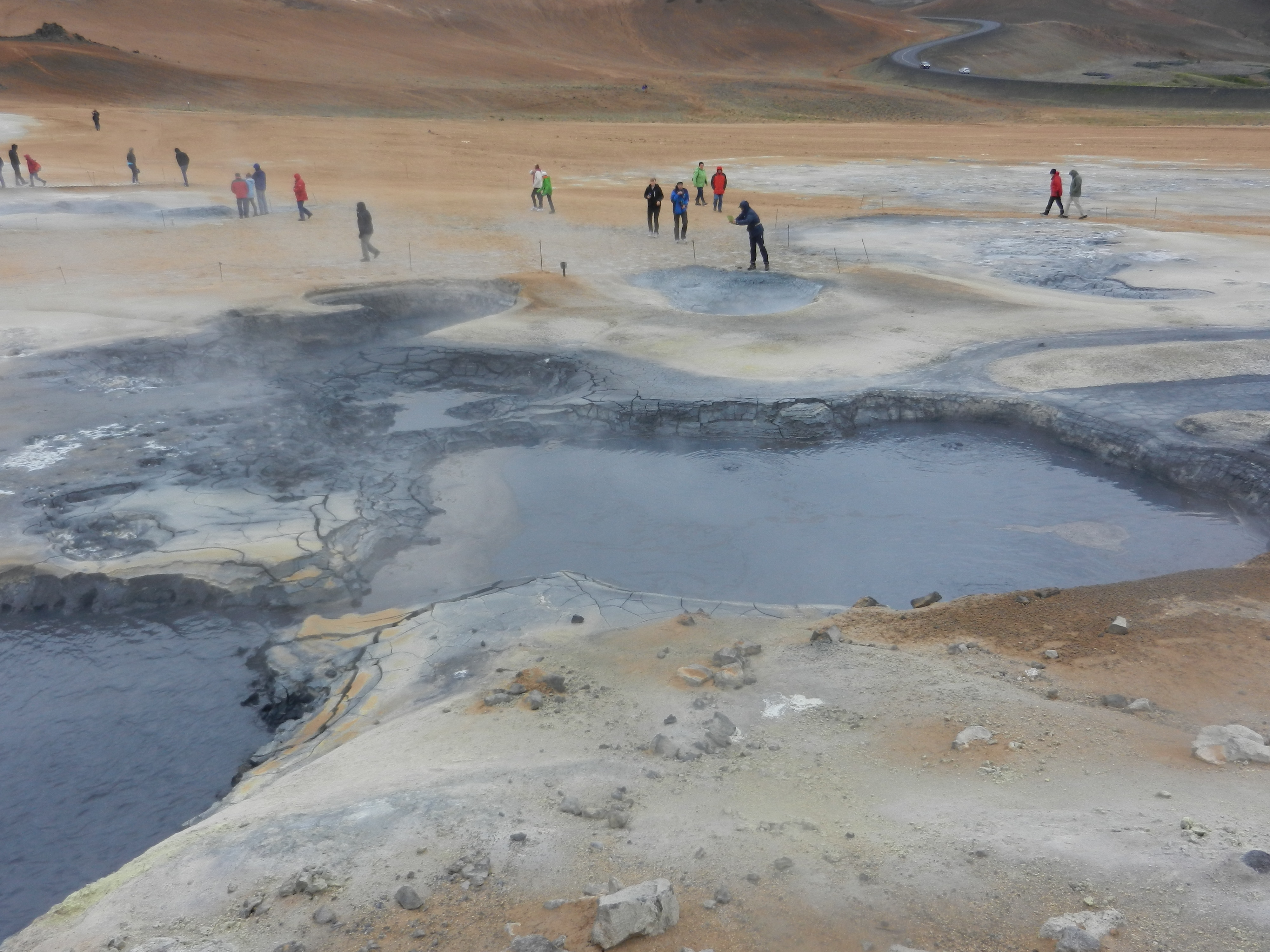 Območje solfatar in brbotajočih blatnih loncev Namafjall-Hverir, Islandija.